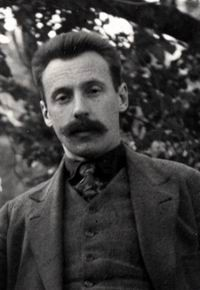 Подбельский, Вадим Николаевич